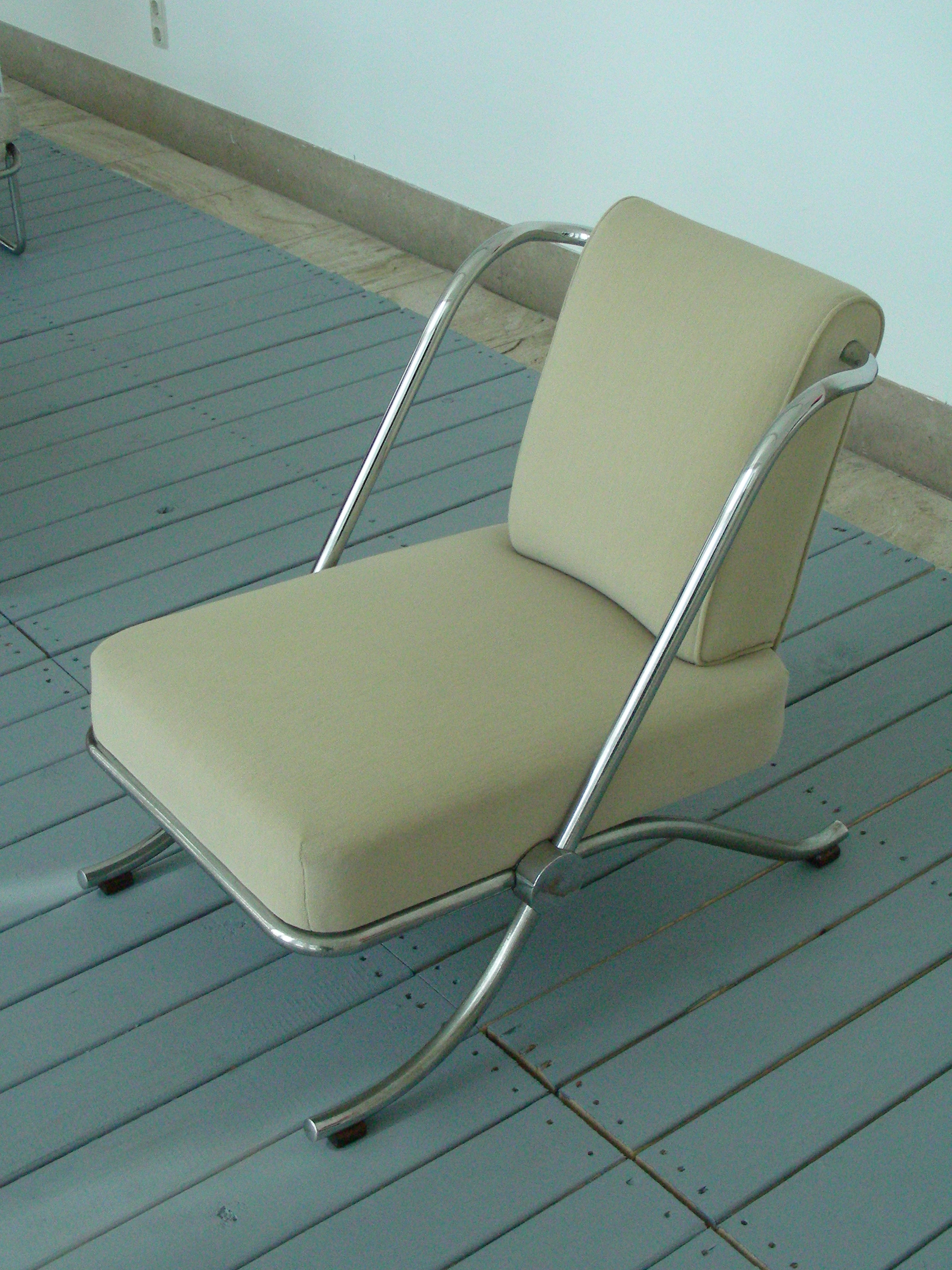 Breistoel, ontwerp J.J.P. Oud (1950) Verchroomd stalen buis, textiel